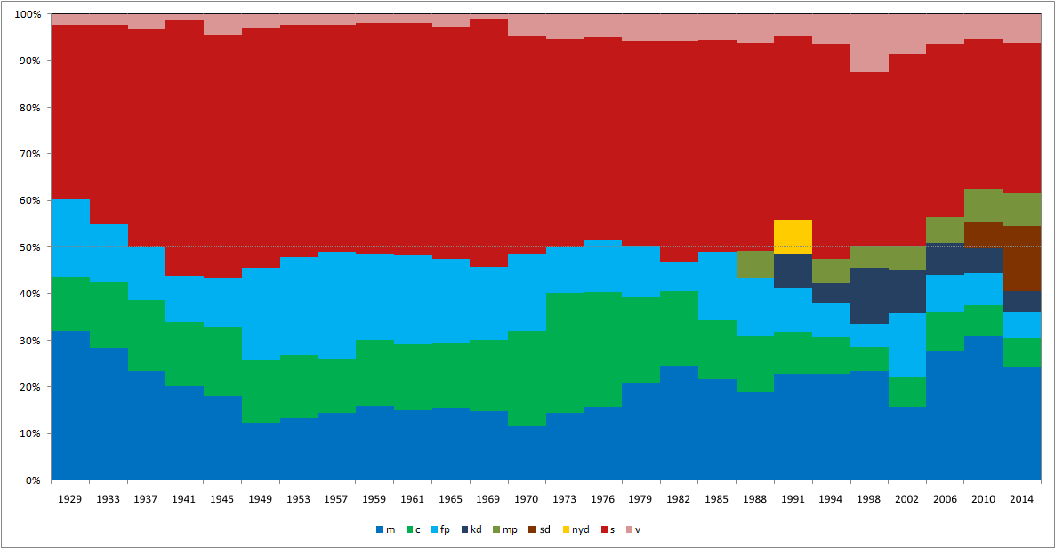 Graf över mandatförhållande i Sveriges Rikstad från 1929 till 2006.